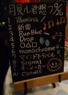 amiinaセトリボード(20150926(1))